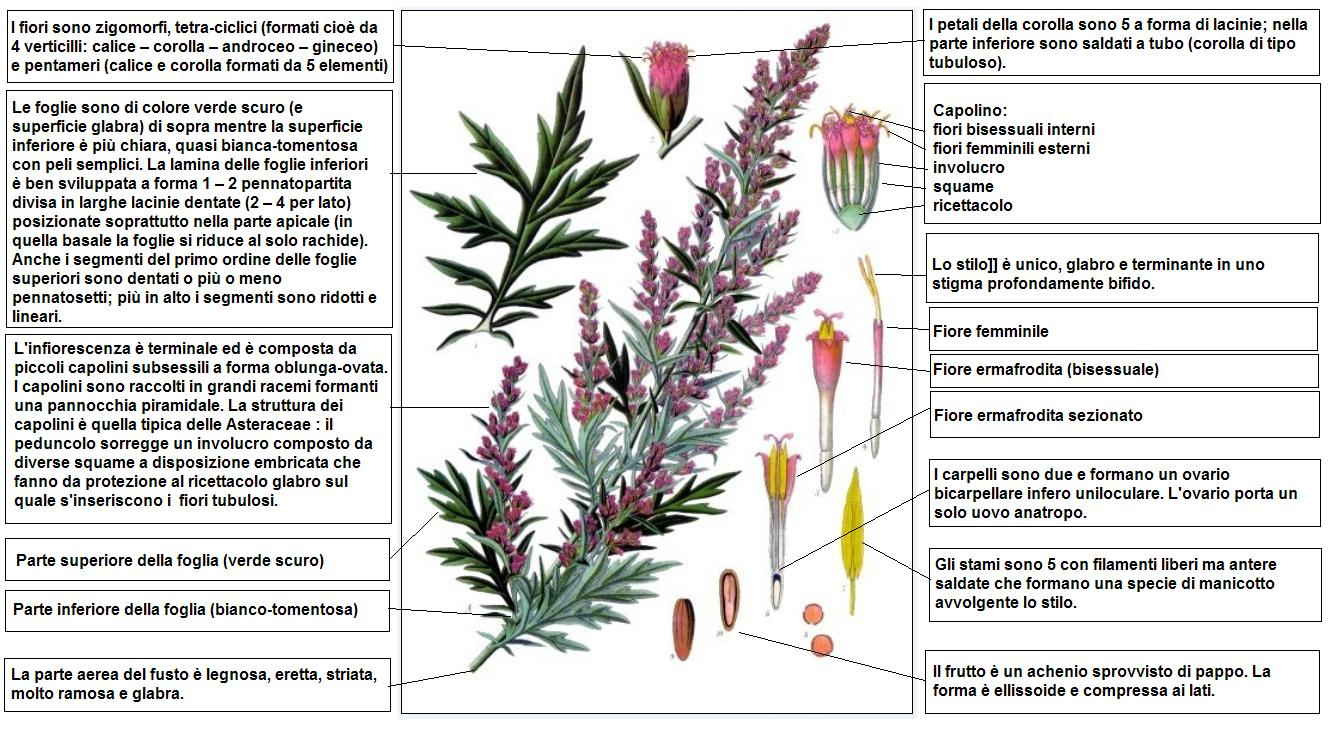 Artemisia vulgaris - Koehler DESC